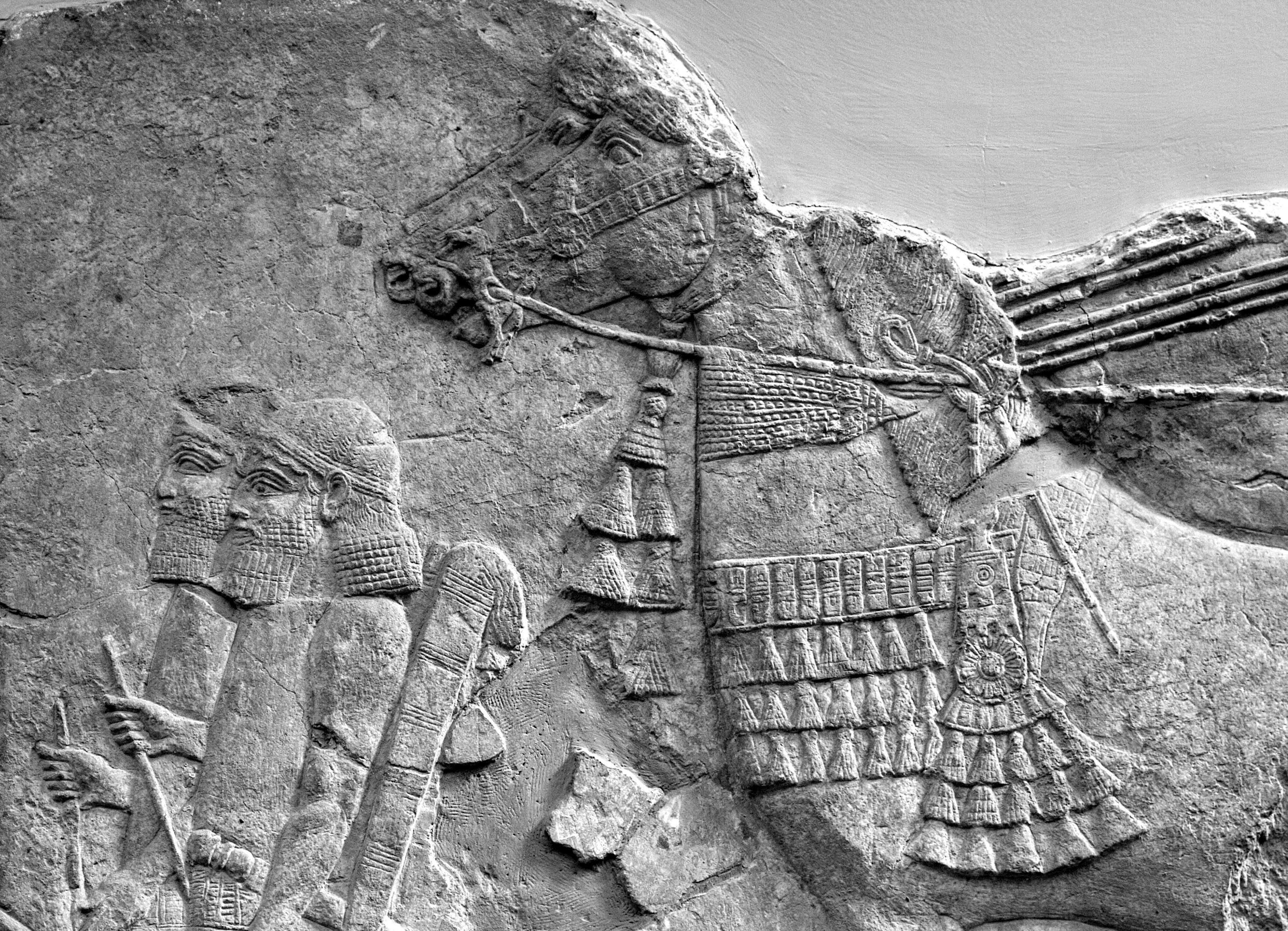 Detalle de un relieve asirio en piedra, con dos sodlados (arqueros y un caballo (de un carro de guerra) del ejército asirio, probablemente del siglo VII a. C..